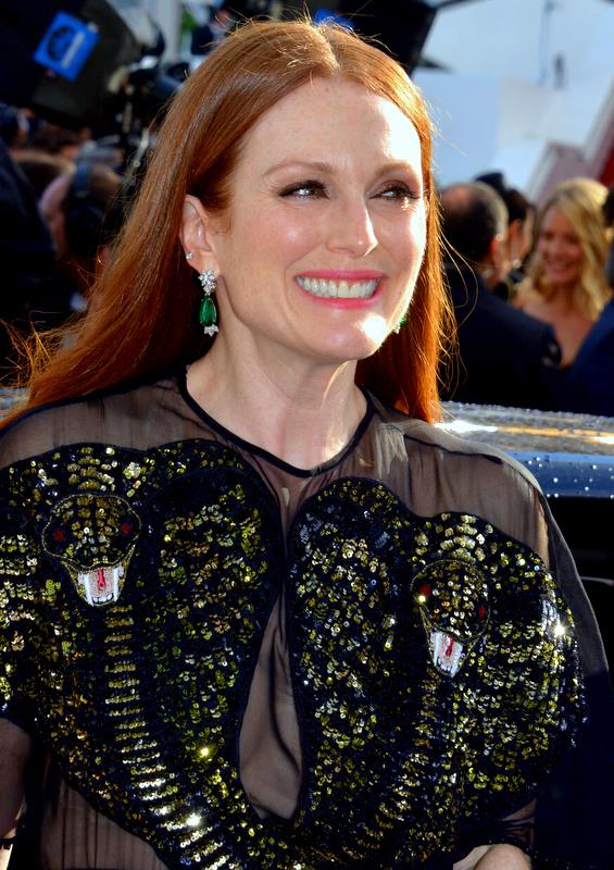 Julianne Moore au festival de Cannes